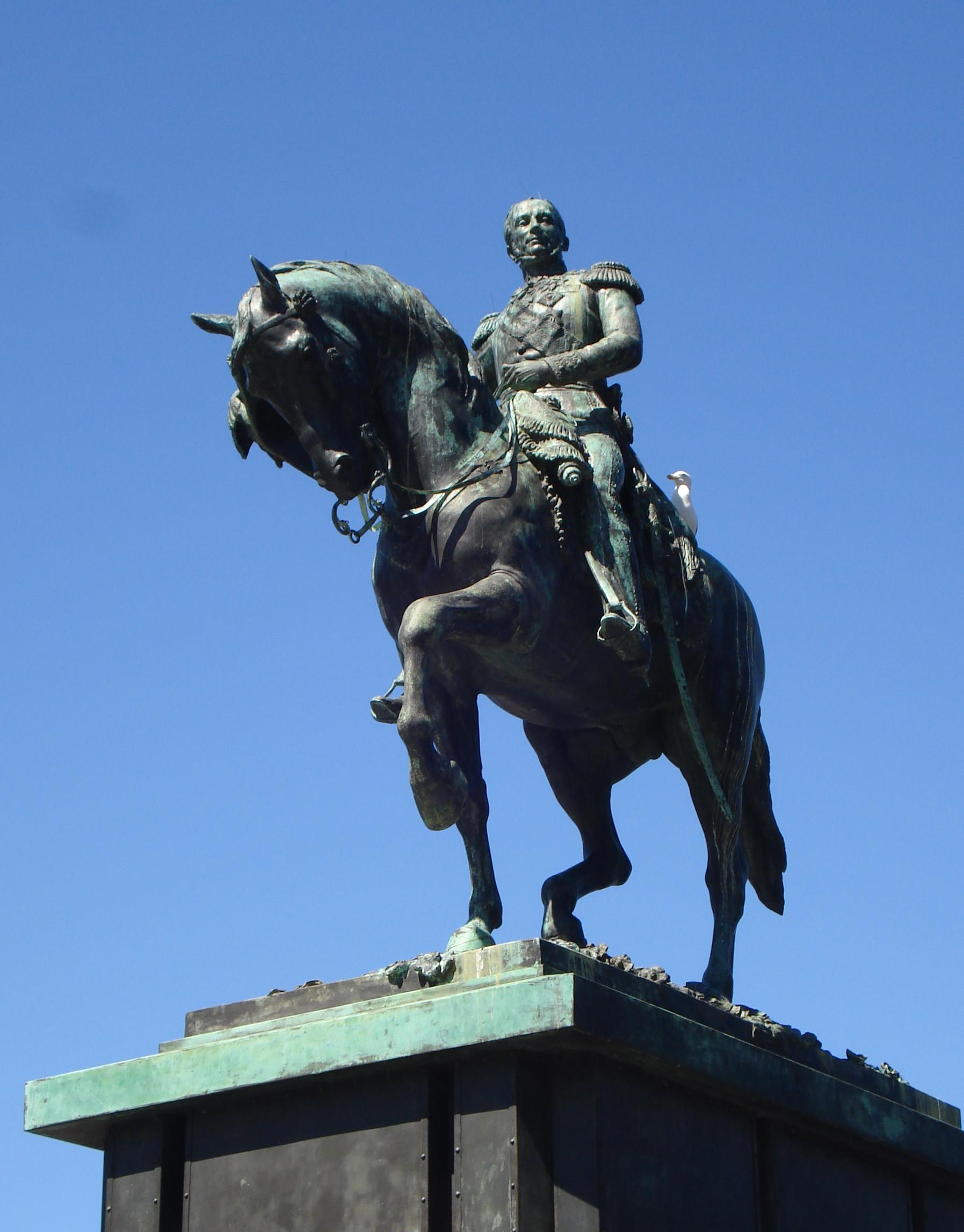 Den Haag, Buitenhof. Ruiterstandbeeld Willem II van Antonin Mercié. Den Haag/The Netherlands.